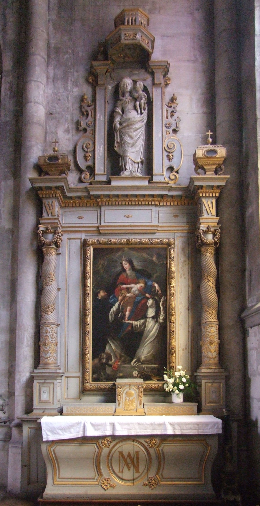 Vernon (Eure, France), Church of Notre Dame de Vernon, chapelle du Rosaire, autel et son tabernacle, retable et sa toile l'Institution du Rosaire de Claude Vignon vers 1635, classée M.H..